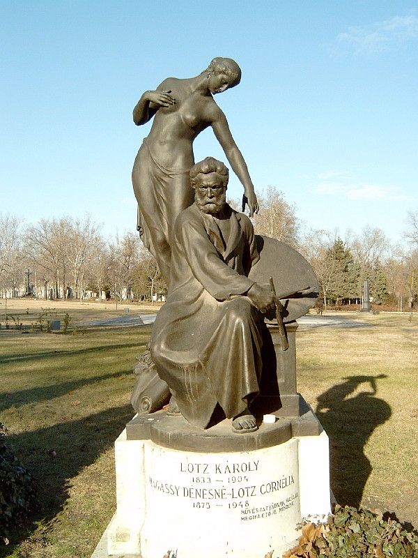 Lotz Károly sírja Budapesten, a Kerepesi temetőben, 28-díszsor-40